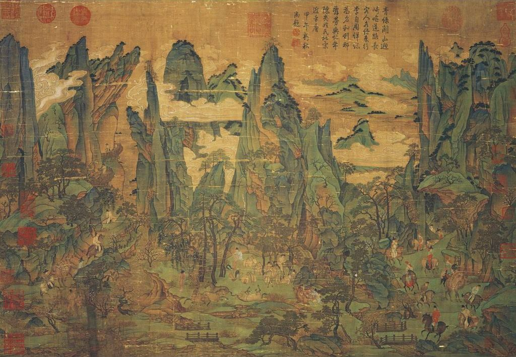 L'Empereur Minghuang voyageant dans le Shu (ou : "en fuite vers le Shu"). Trois épisodes se lisant de droite à gauche. L'exécution suit le style des paysages peints sous la dynastie des Tang au VIIIe siècle, style qui fut plus tard dénommé "bleu et vert". Traditionnellement attribué à Li Zhaodao (760-830). Copie vraisemblablement du 12e siècle. Rouleau mural, à suspendre (si l'on tient compte du sens des brisures dans la couleur).